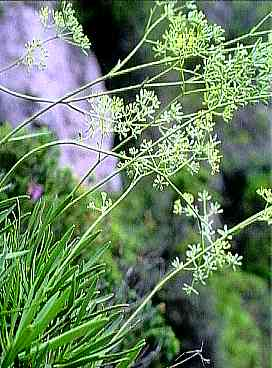 Sicilian botanical endemisms Bupleurum dianthifolium